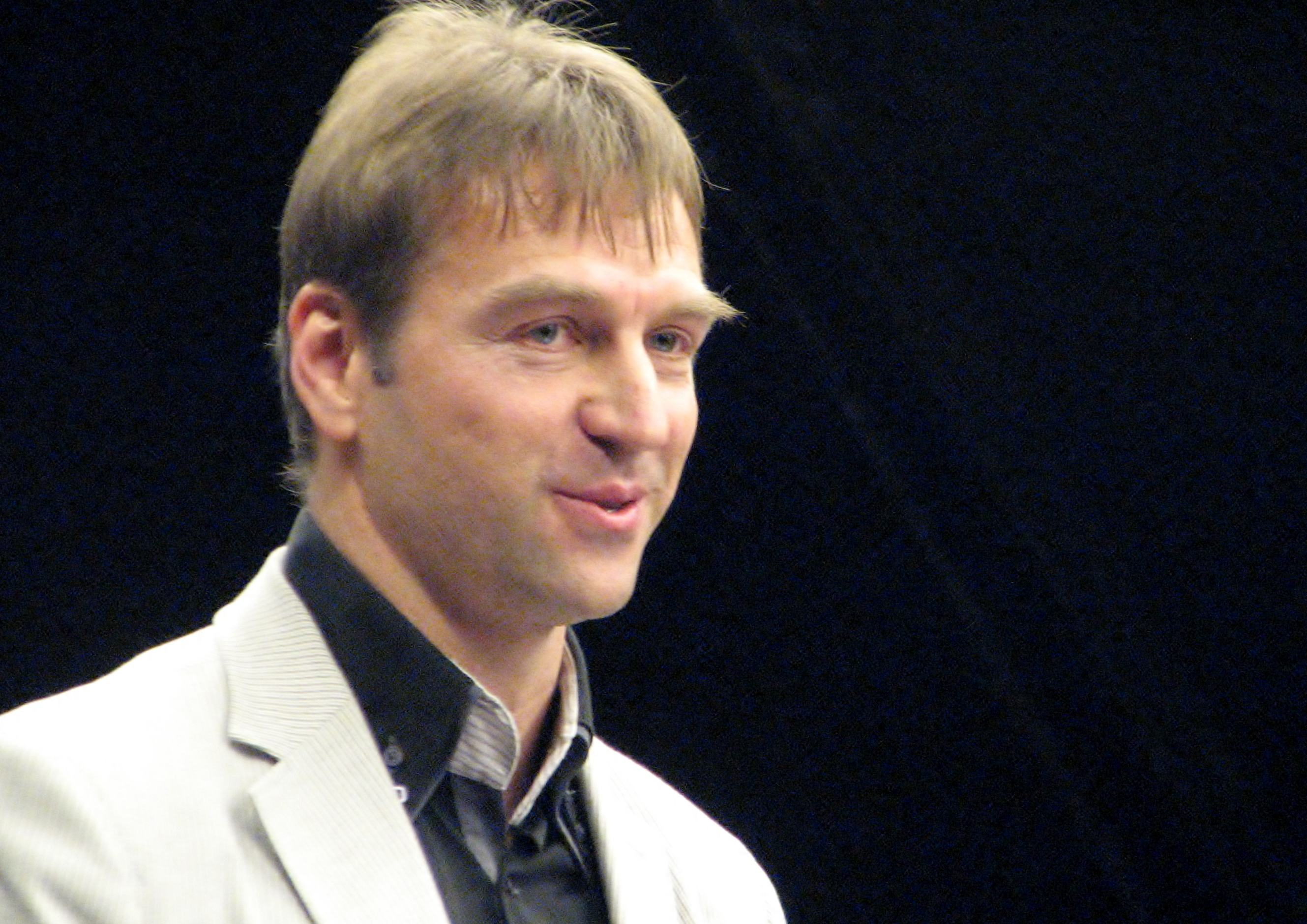 keel" Eesti Draamateatri maalisaalis